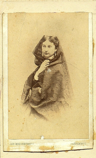 М. Н. Лазаревская, урожденная Шеншина, жена Ивана Матвеевича Лазаревского, мать Николая, Марии, Михаила и Ивана.